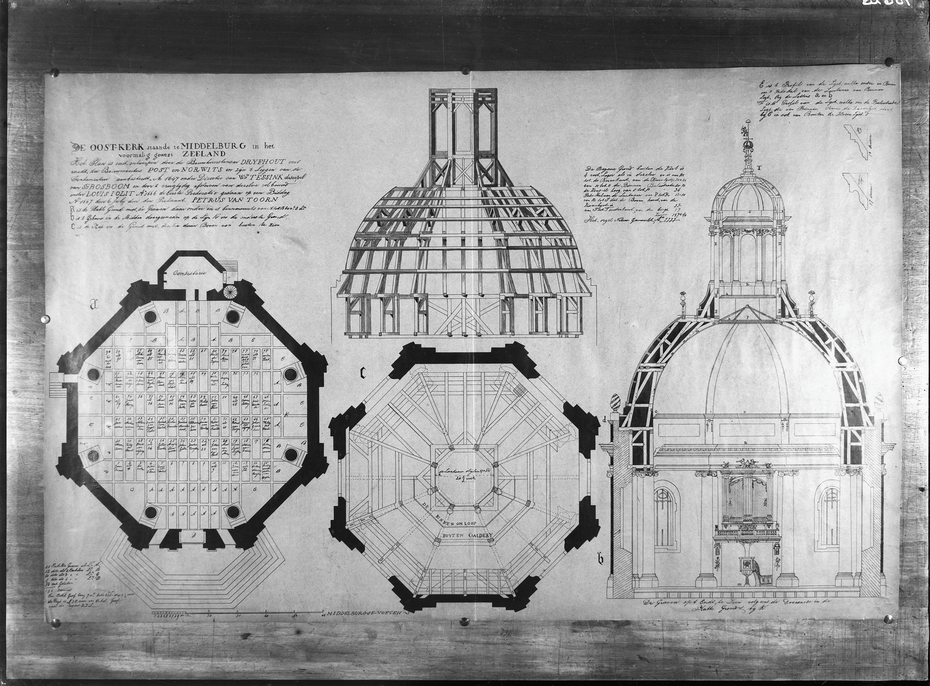 Oostkerk: plan naar tekening in het Zeeuws Genootschap van Wetenschap